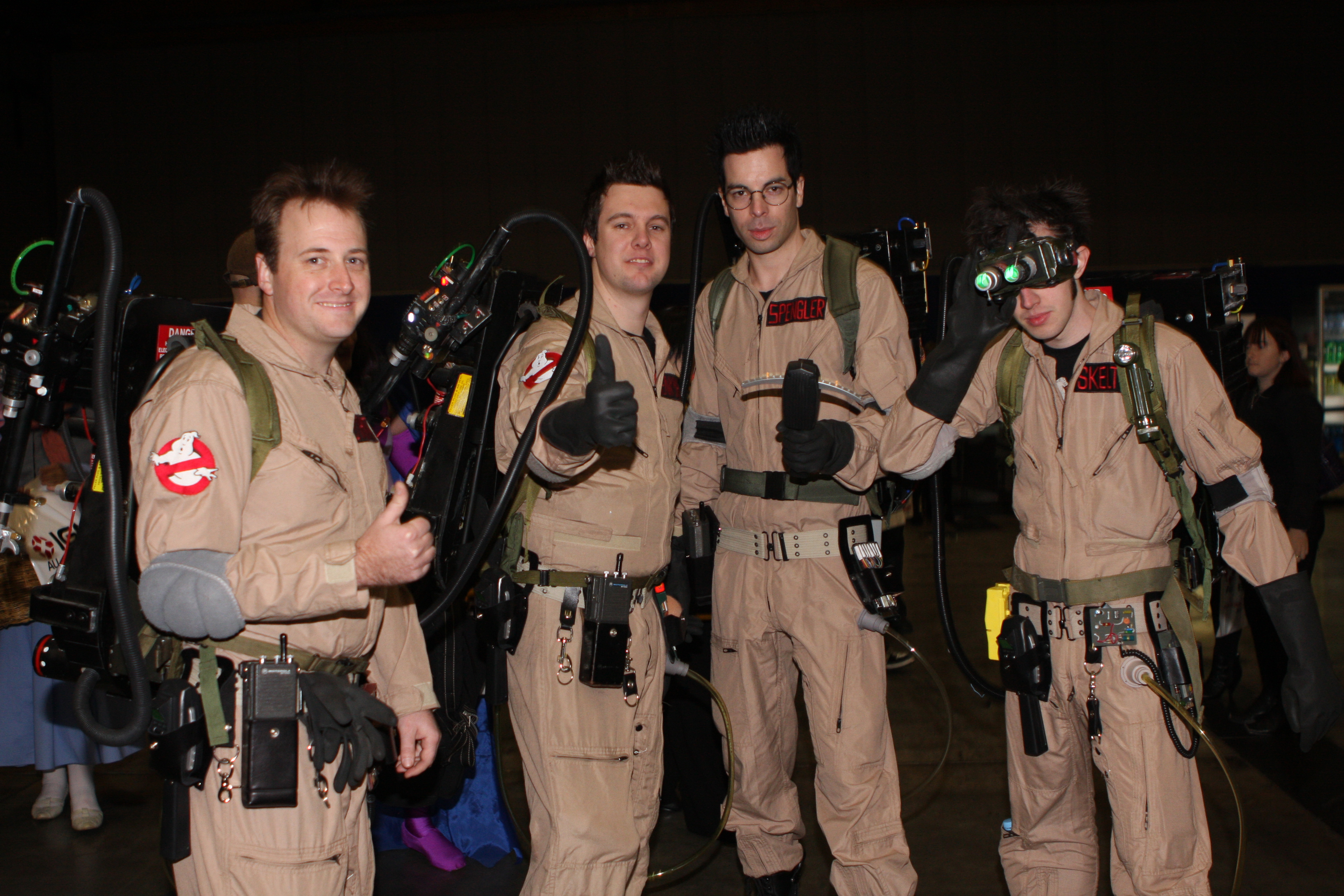 Ghostbusters at Supanova 2014